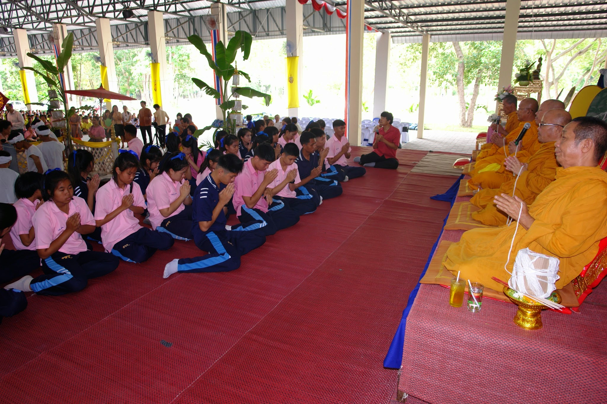 พิธีหล่อเทียนพรรษา ส.ว.2557 2